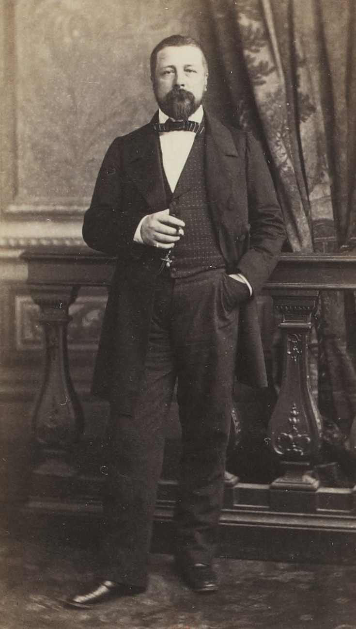 Album des députés au Corps législatif entre 1852-1857.